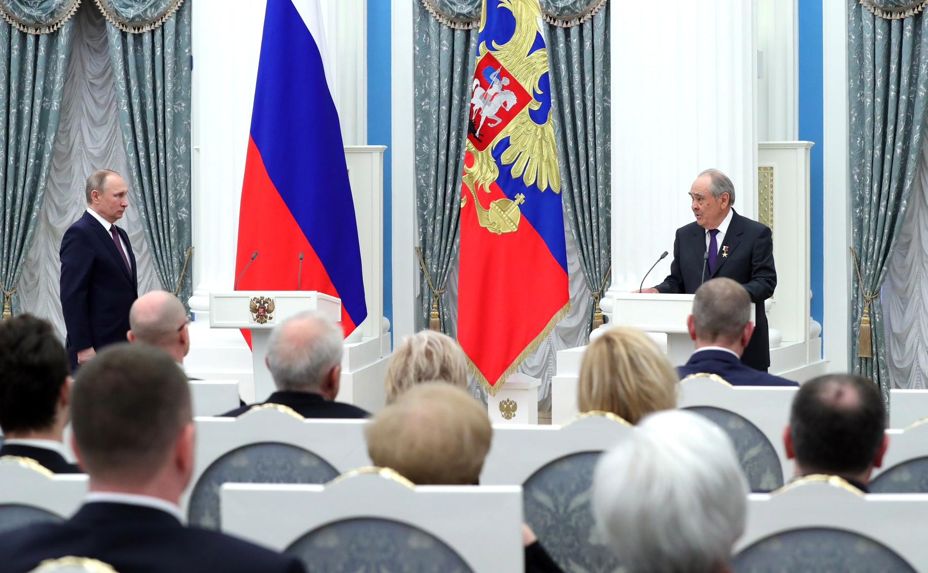 Вручение медалей «Герой Труда Российской Федерации». Звание Героя Труда присвоено Государственному Советнику Республики Татарстан, Председателю Попечительского совета некоммерческой организации «Республиканский Фонд возрождения памятников истории и культуры Республики Татарстан» Минтимеру Шаймиеву.